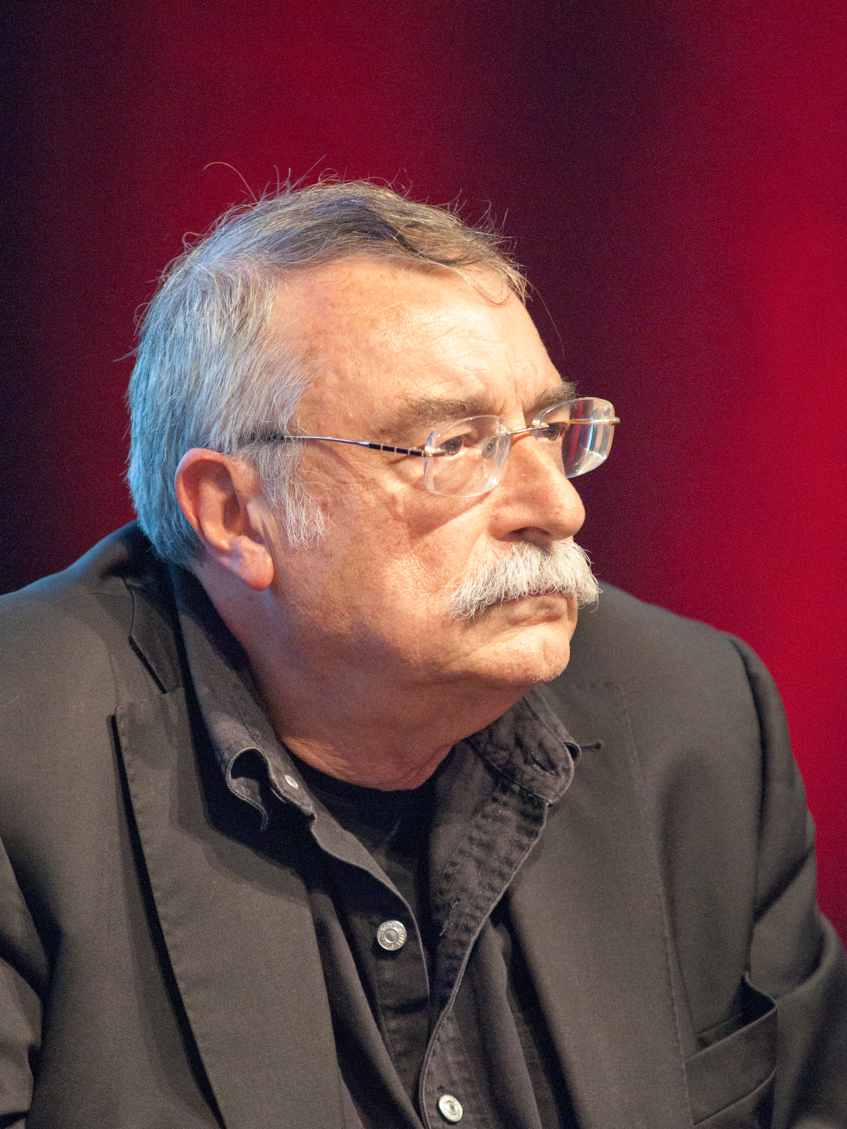 Salon du livre 2011 à Genève - Ignacio Ramonet.